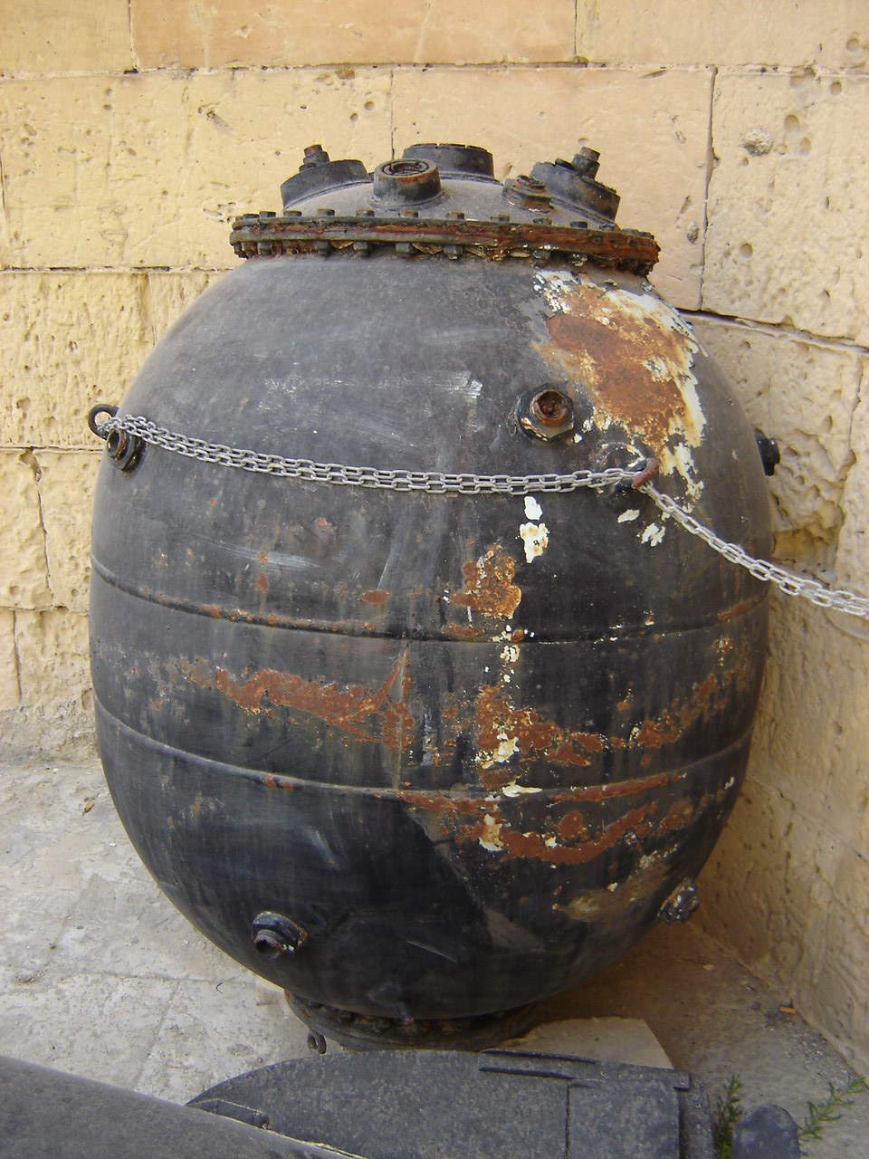 Seemine zur schwimmenden Auslegung an Ankerkette. Die Anschlüsse sind für die Berührungszünder. - Waffen und Kriegsmaterial aus dem 2. Weltkrieg, fotografiert in Malta April 2006. Genauere Deklaration benötigt, deshalb erst hier hochgeladen.